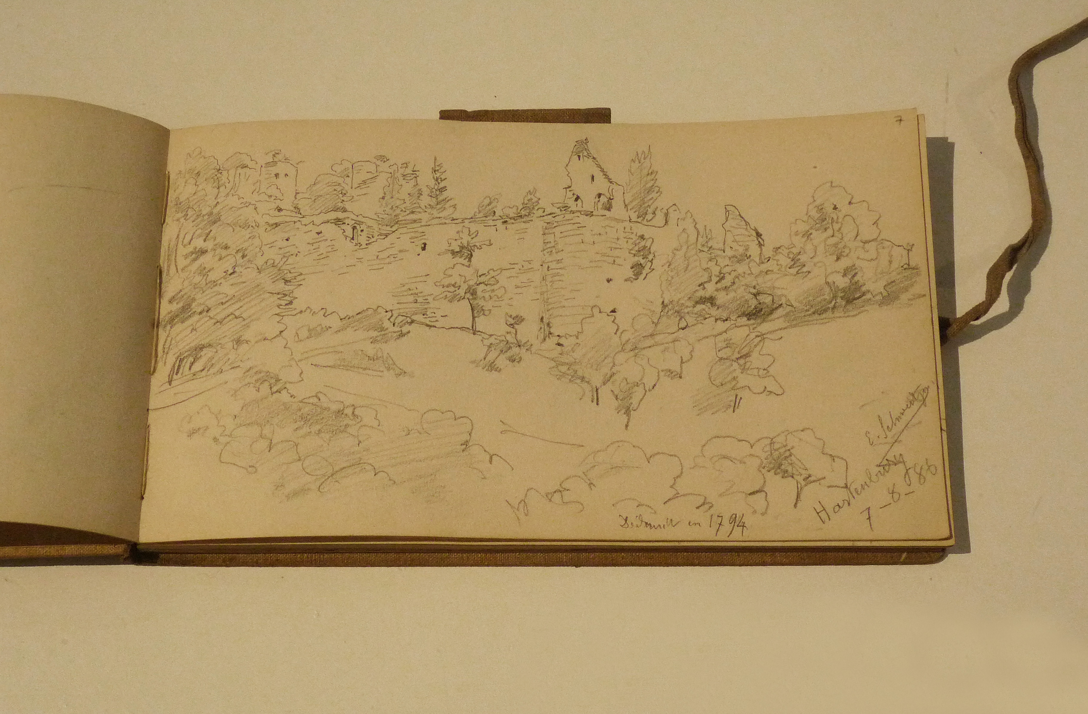 Carnet de croquis d'Emile Schweitzer, Hartenbourg, crayon sur papier, Cabinet d'art graphique du Musée d'art moderne et contemporain de Strasbourg